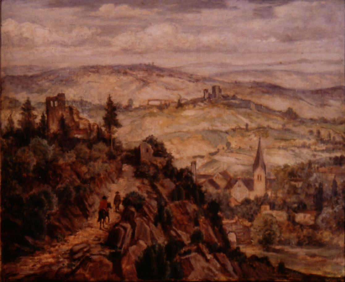 Landschaftsportrait des Künstlers Walter Schliephacke, Öl auf Leinwand.